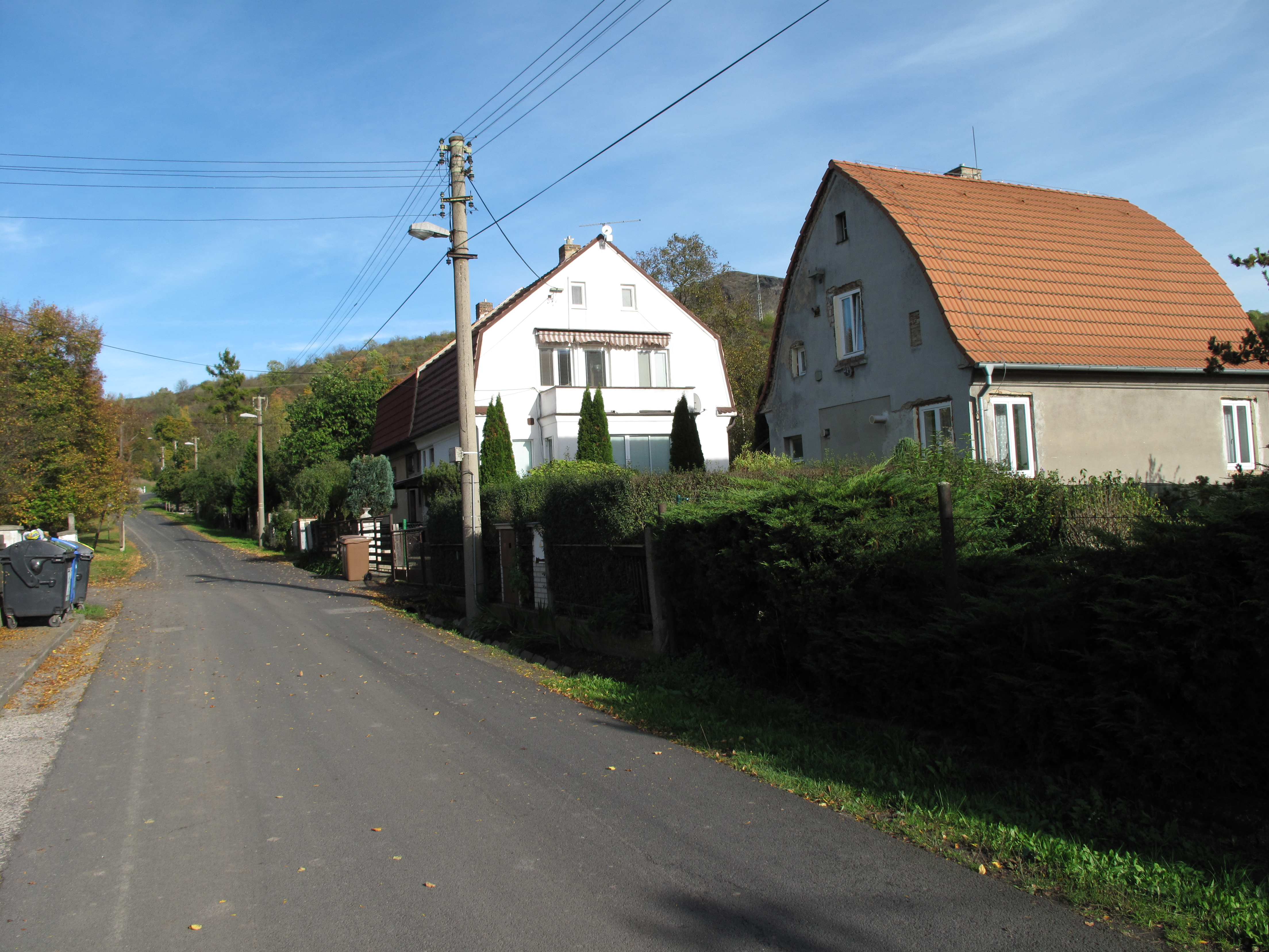 Domy v Žalhosticích. Okres Litoměřice, Česká republika.